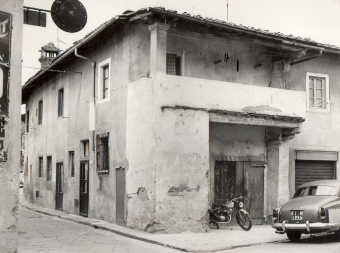 Casa Vespucci angolo via di Peretola n.8 e via delle Compagnie